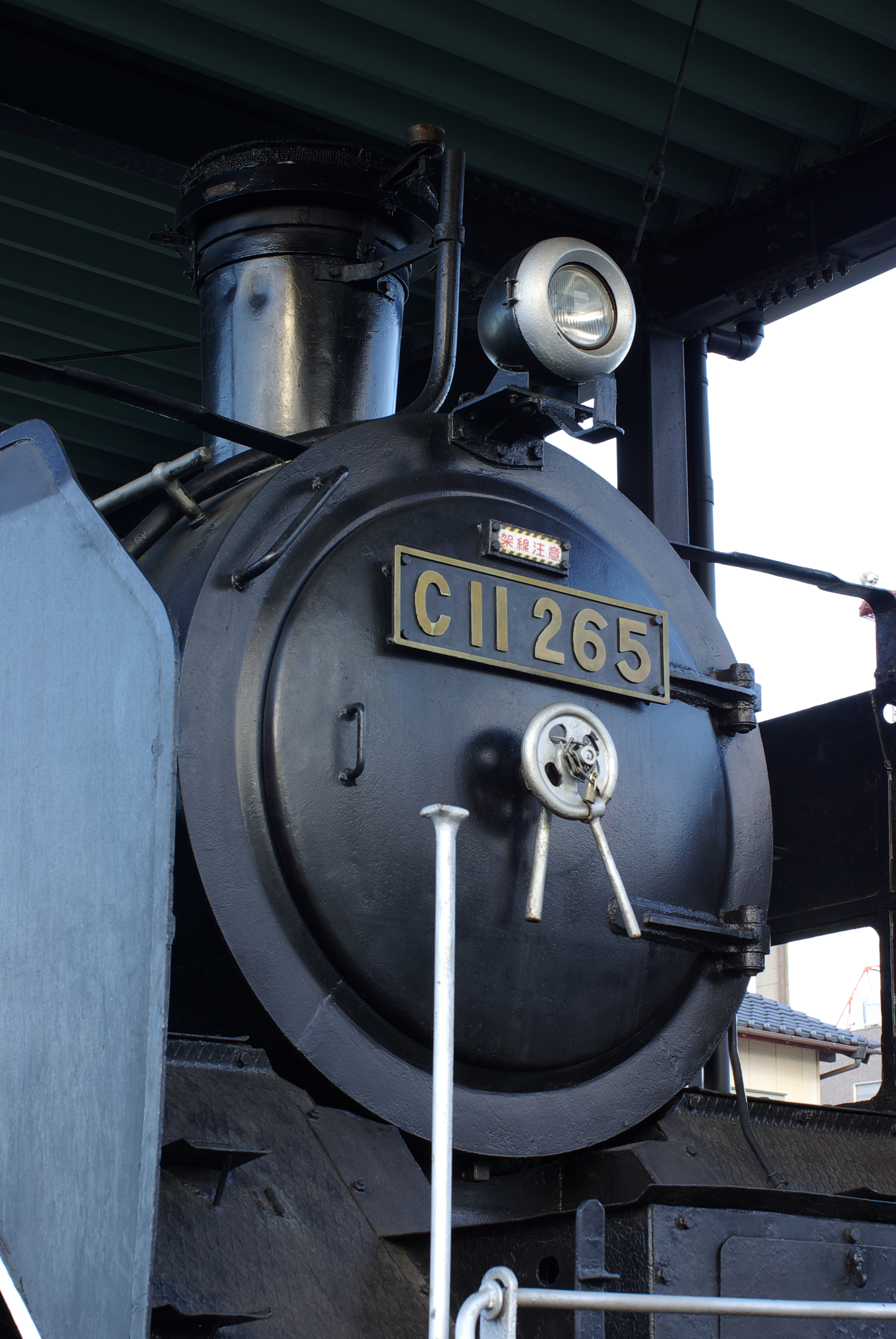 半田市鉄道資料館に静態保存されるC11 265のナンバープレート